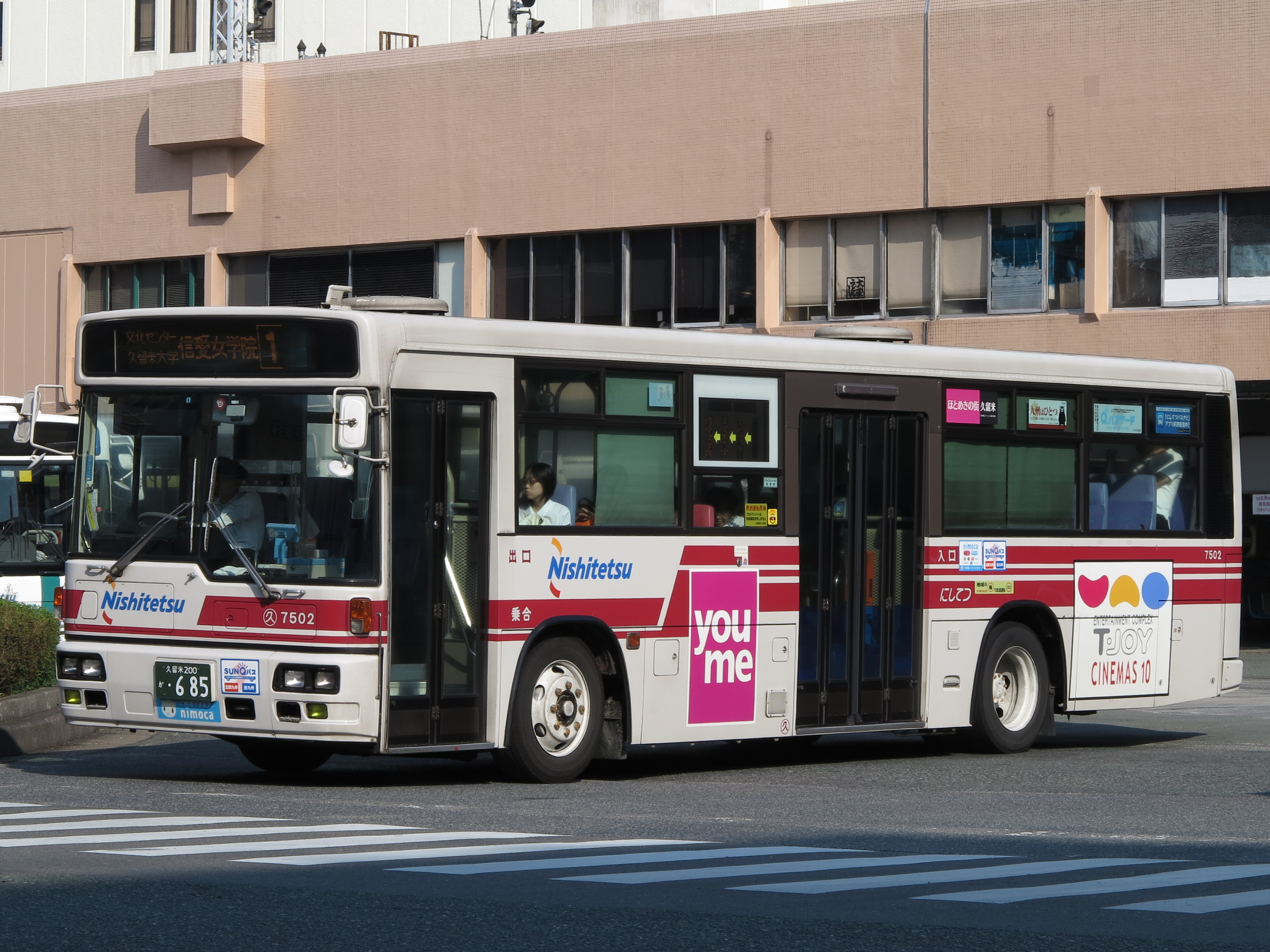 西鉄バス久留米・本社所属 7502号車 西鉄久留米駅前にて